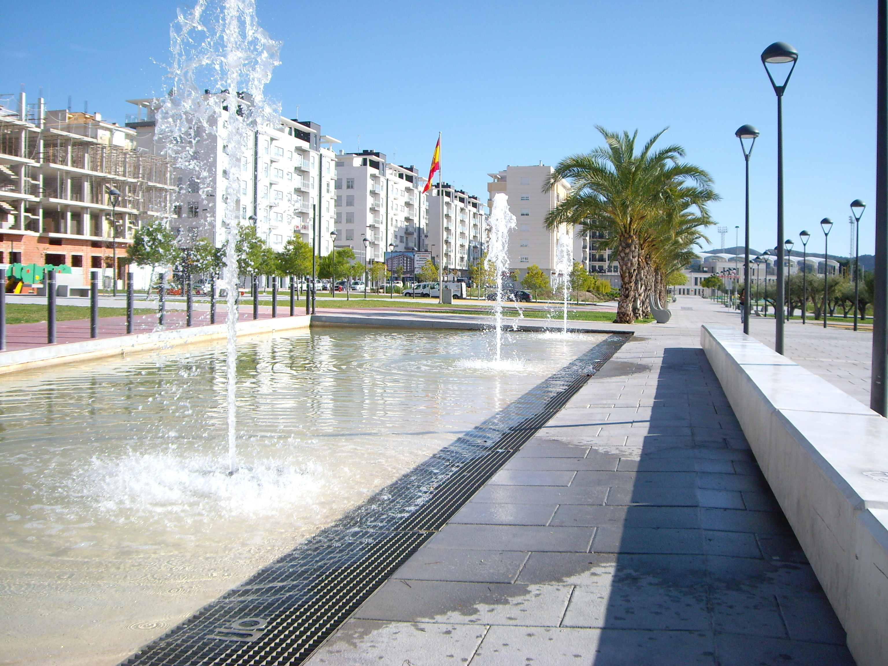 Parque Lineal del Sector 9, Elda.